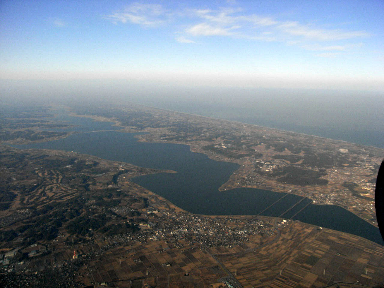 霞ヶ浦・北浦空撮。